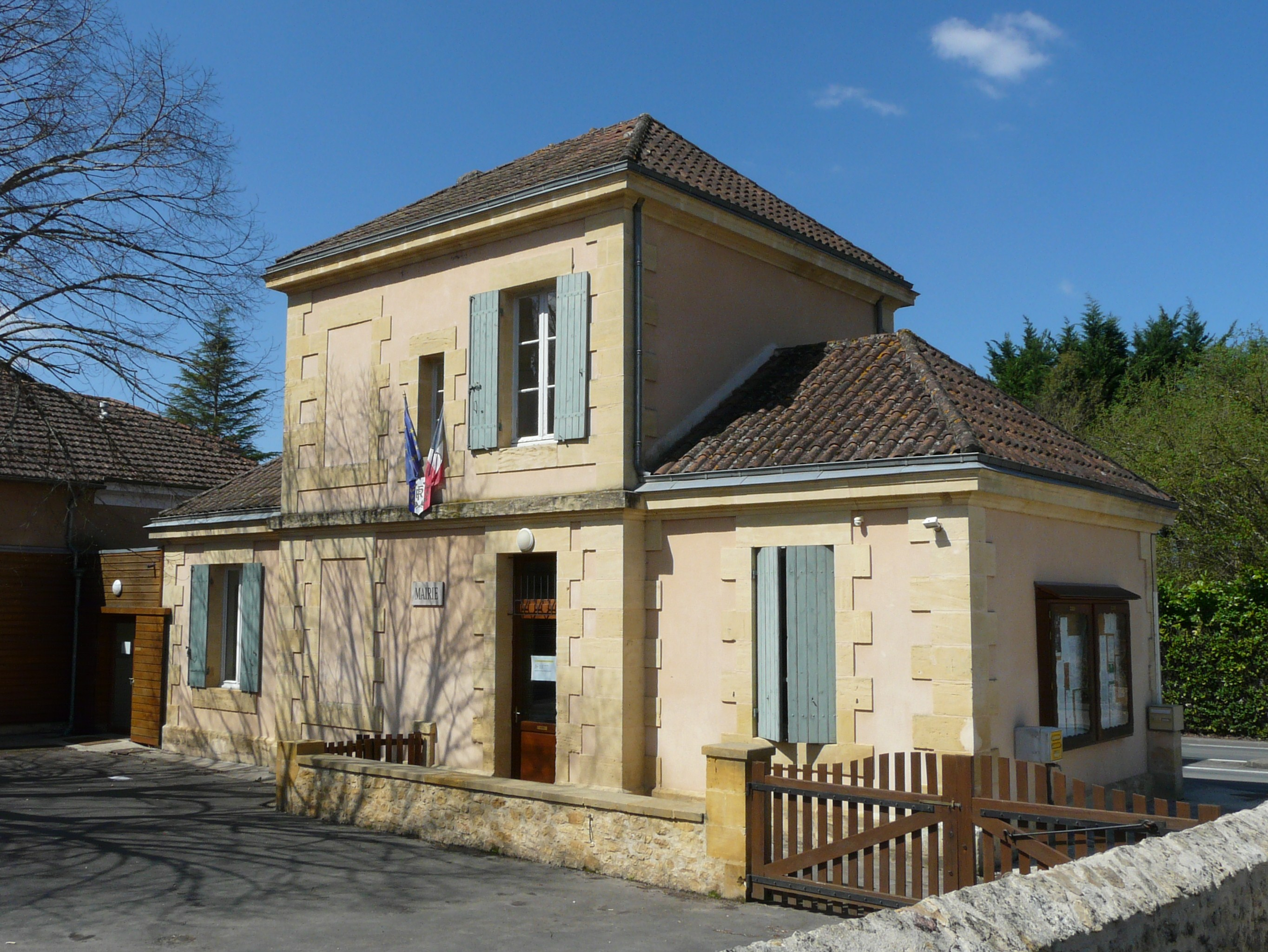 La mairie de Badefols-sur-Dordogne, Dordogne, France.